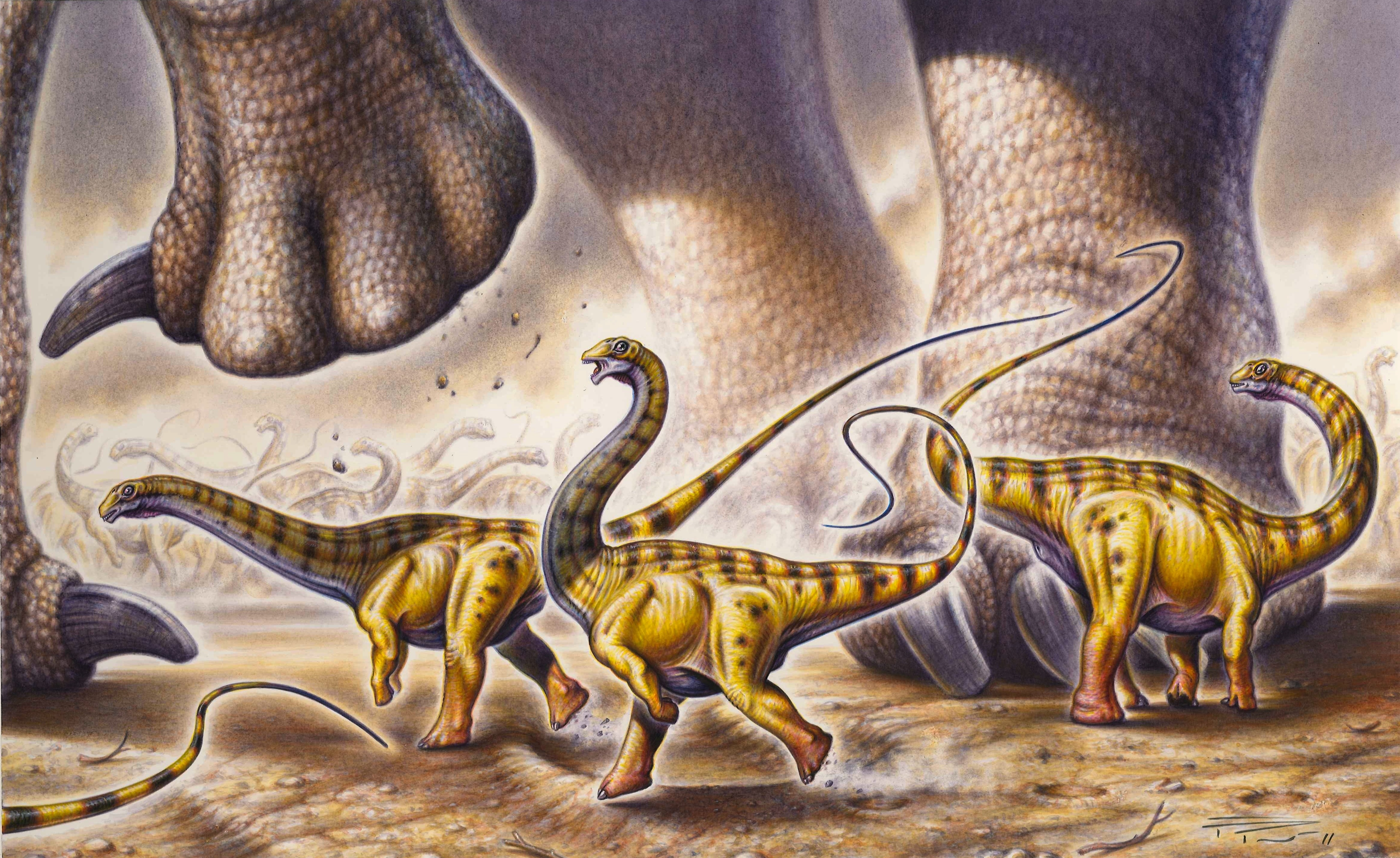 Apatosaurus ajax - running babies acrylics by brush on cardboard size 39.5 x 24.5 cm (15.5 x 9.6 inches) Scientific supervision and text by Matthew Mossbrucker "Description of Fabio’s Apatosaurus ajax painting This painting depicts a historic Morrison Formation site, Quarry 5 in Morrison, Colorado. Discovered by Arthur Lakes in the spring of 1877, this site is most significant because it produced the type of Stegosaurus armatus, Yale Peabody Museum specimen 1850. Sauropod remains have been documented at this site as well. Recent investigations at Quarry 5 yielded trace fossils on the top of the beds that contain the body fossils, including tracks likely made by juvenile and adult Apatosaurus ajax. On a single ex situ boulder, juvenile sauropod trackways demonstrate two distinct footfall cadences – a near heel-toe hind track pattern, and a trackway that shows twice the amount of space (as compared to the aforementioned tracks) between footfalls in tracks the same size. This indicates that the two trackways represent distinct locomotion pattern: the closer footfalls a walking speed with the wider footfalls representing a low-speed ‘run.’ While the trackway of close footfalls does demonstrate relatively shallow, lunate manual tracks, the wider footfalls have no features representing manual tracks (either overstepped or not). This suggests the possibility that young Apatosaurus had the capability of moving short distances bipedally. Patient work at Quarry 5 is ongoing - hampered by very hard, silicic sandstone." Matthew T. Mossbrucker Director and Chief Curator ____________________________ Morrison Natural History Museum